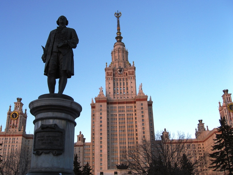 Estatua de Mijaíl V. Lomonósov frente al edificio principal de la Universidad Estatal de Moscú